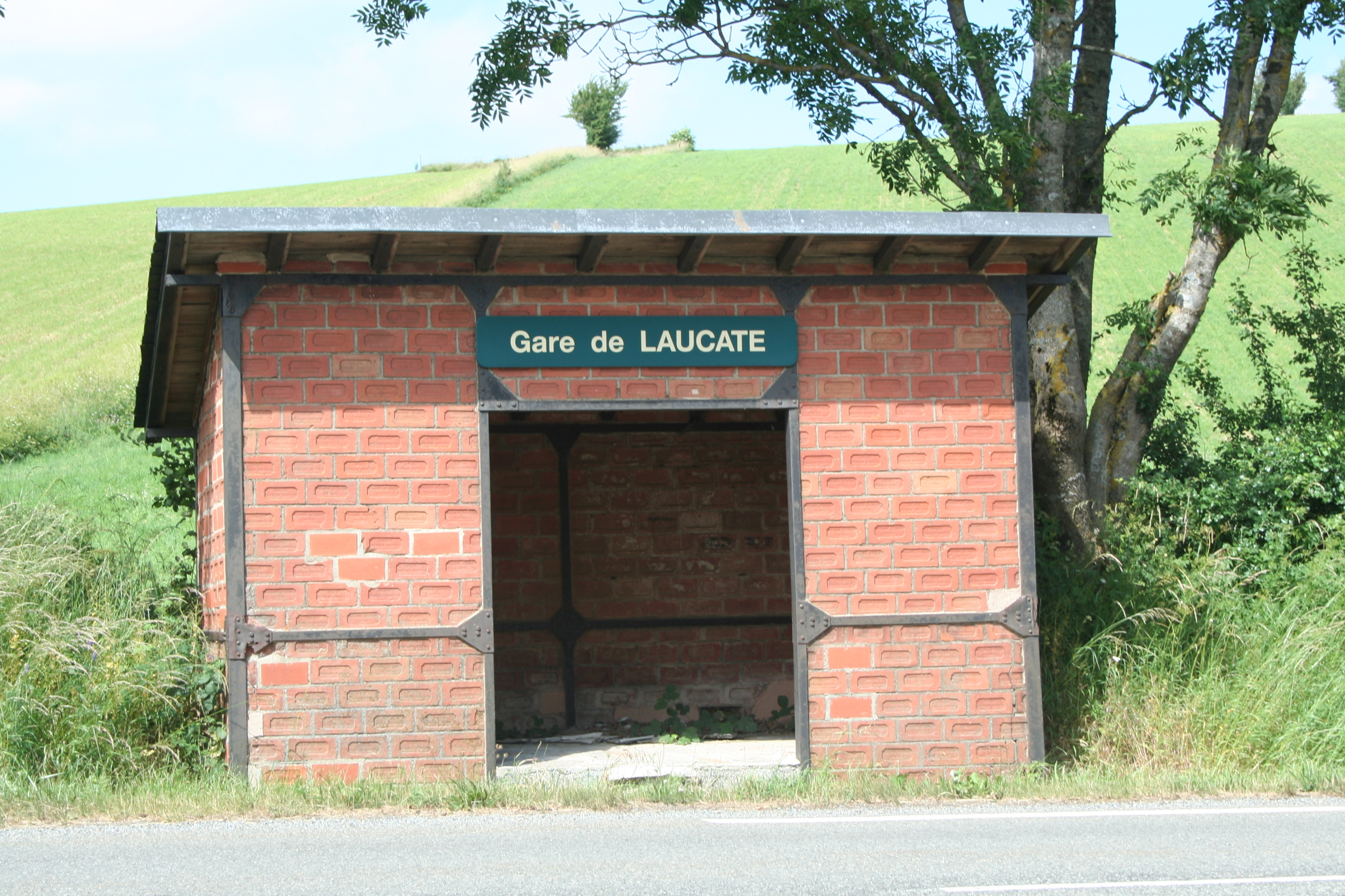 Moulin-Mage (Tarn) - gare de Laucate de l'ancienne ligne Castres-Murat (fermée en 1962)